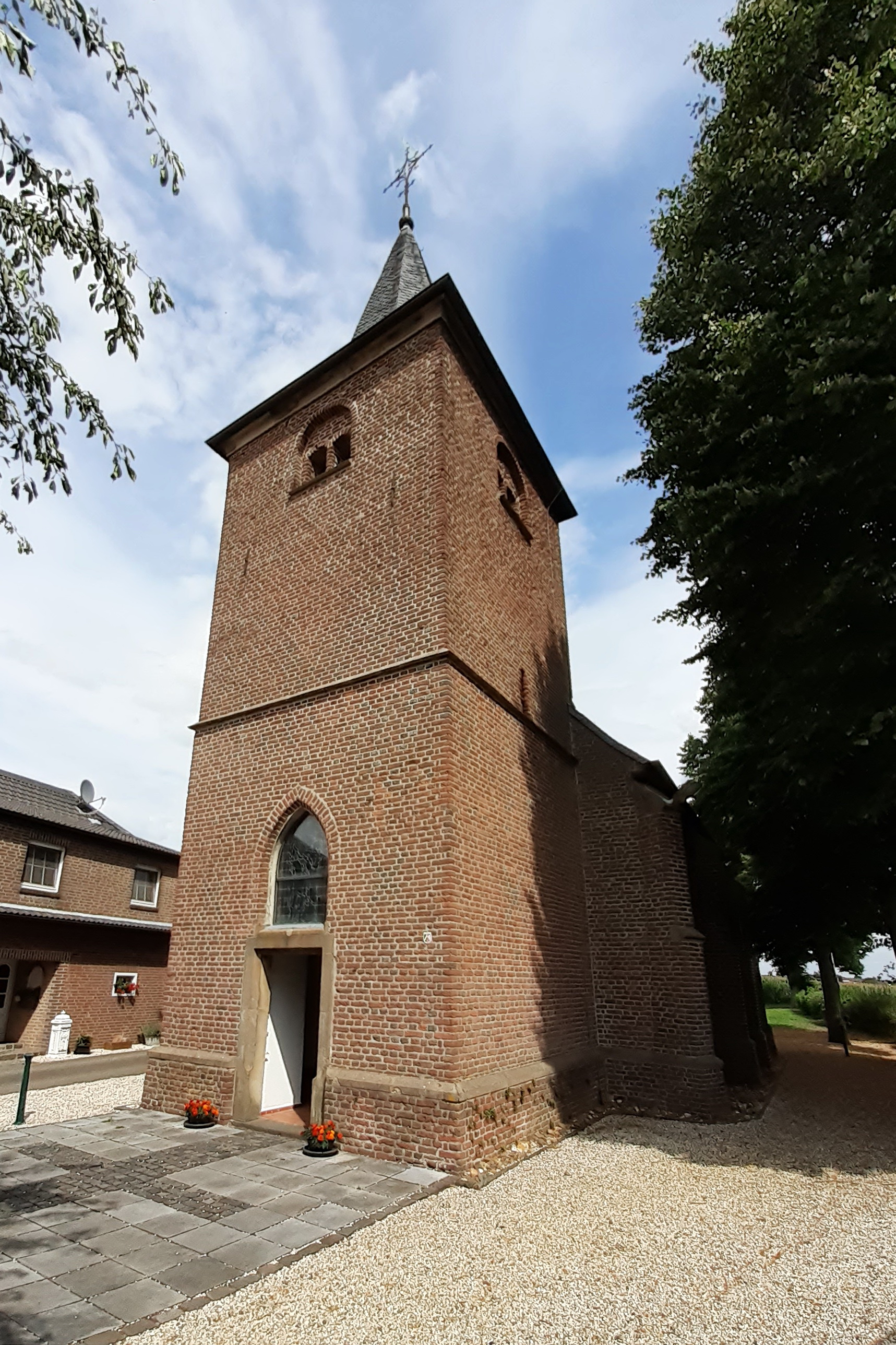 Kapelle St. Hubertus Keylaer (Ersterwähnung 1381) in Kevelaer, Hubertusstraße. Älteste Kapelle Kevelaers, This image shows a heritage building in Germany, located in the North Rhine-Westphalian city Kevelaer (no. A 173).